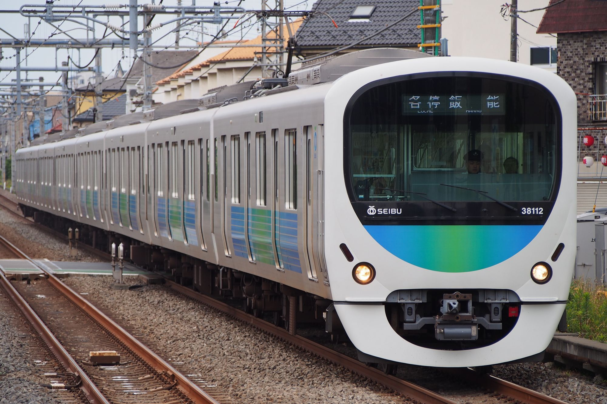 かつては、早朝の下り列車と土曜・休日深夜の上りに運転されていた池袋駅 - 飯能駅間の各駅停車だが、2013年3月16日ダイヤ改正より日中時間帯から夕方時間帯まで毎時上下各1本ずつ運転されるようになっている。（2016年6月5日、武蔵藤沢にて）